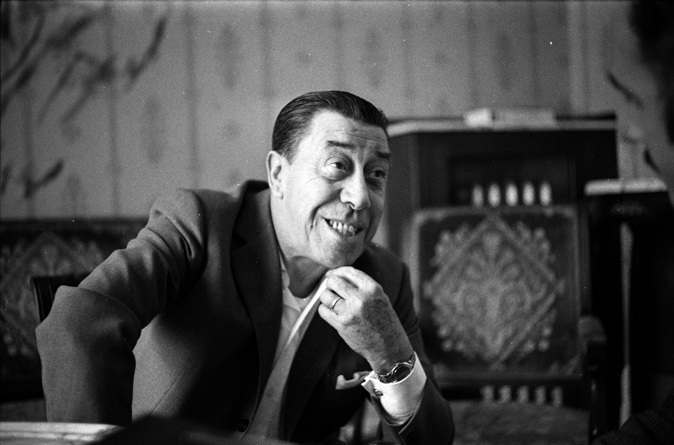 intérieur d'un appartement (ou hôtel) Toulousain. Le 14 mars 1970. Plan rapproché de 3/4, de l'acteur Fernandel se tenant le menton face au journaliste dont on apperçoit le visage dans l'angle droit de l'image, lors d'une interview à l'occasion de la représentation de la pièce de théâtre "Freddy" au théâtre du capitole. Observation: Représentation de la pièce de théâtre "Freddy" au théâtre du Capitole avec les acteurs Fernandel et Kellys.